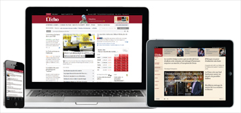 L'Echo est présent en format papier, web, numérique et digital.